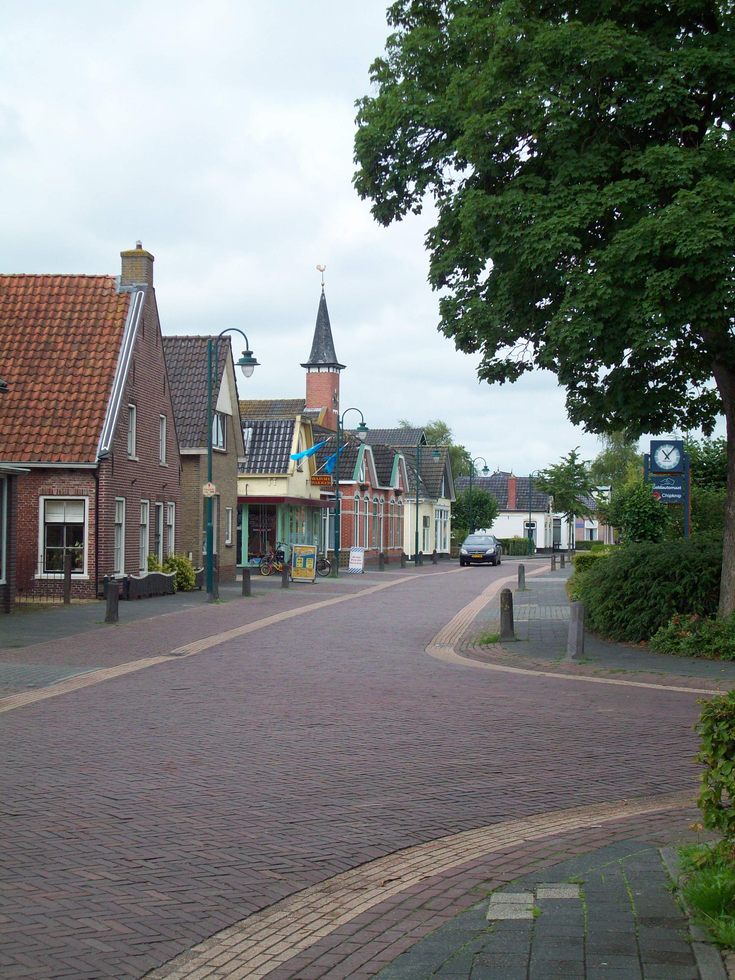 Oudega